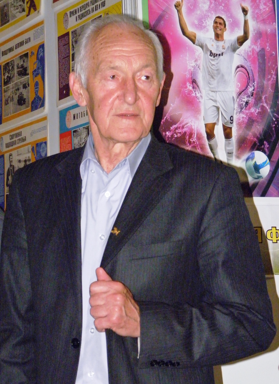 Дворазовий олімпійський чемпіон Юрій Поярков